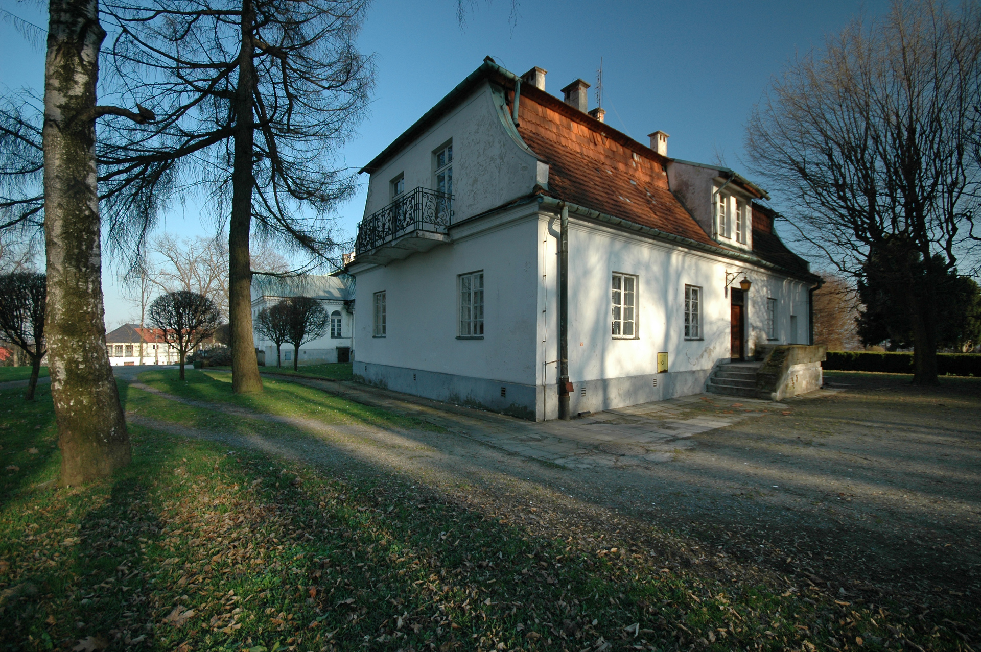 Mogilany - zespół dworski: dwór, park (zabytek nr rejestr. A-650/M)